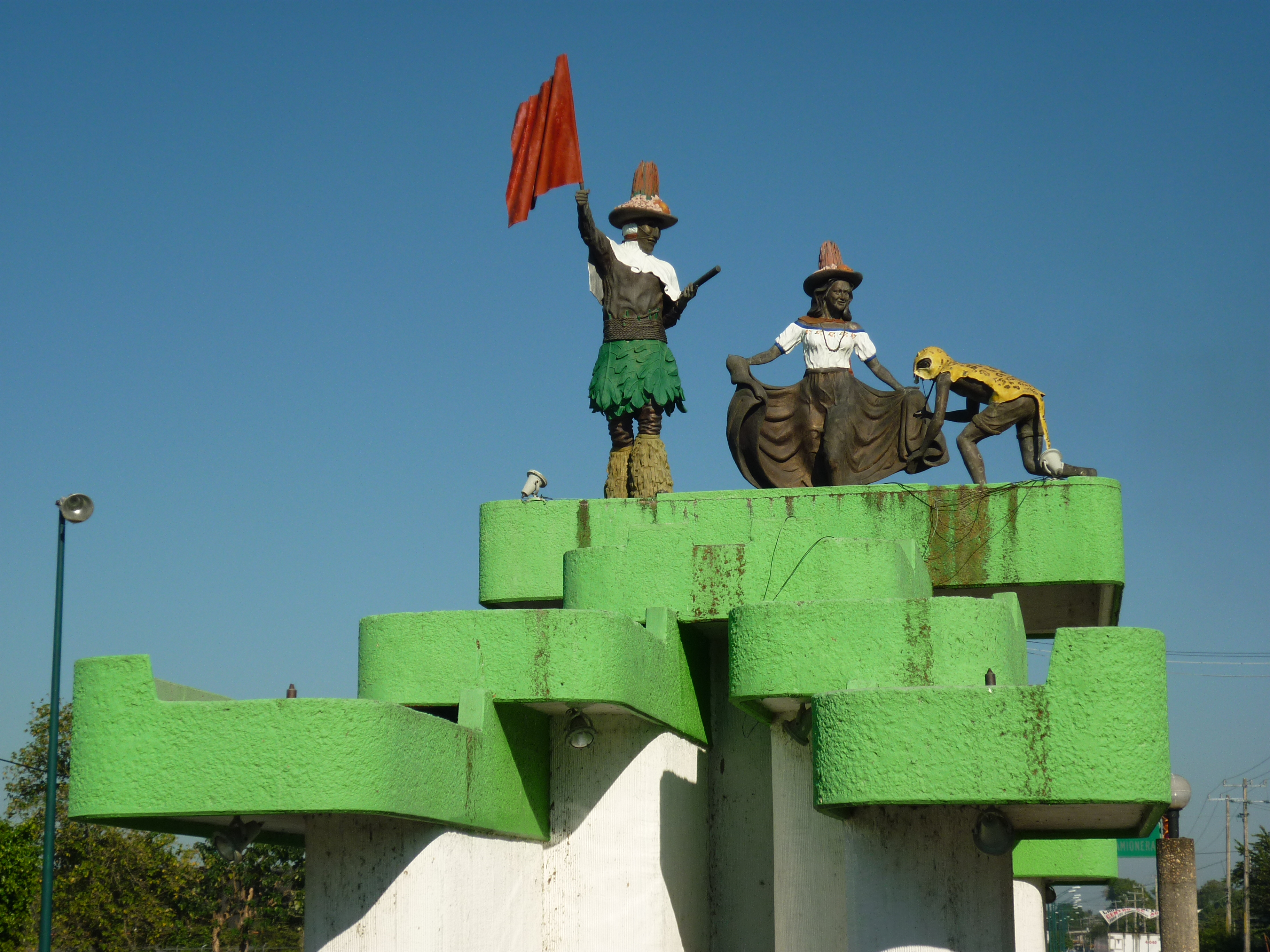 Monumento ubicado a la entrada de Tenosique, en honor a la Danza del Pocho, celebrada cada año durante el carnaval realizado en la ciudad de Tenosique, Tabasco